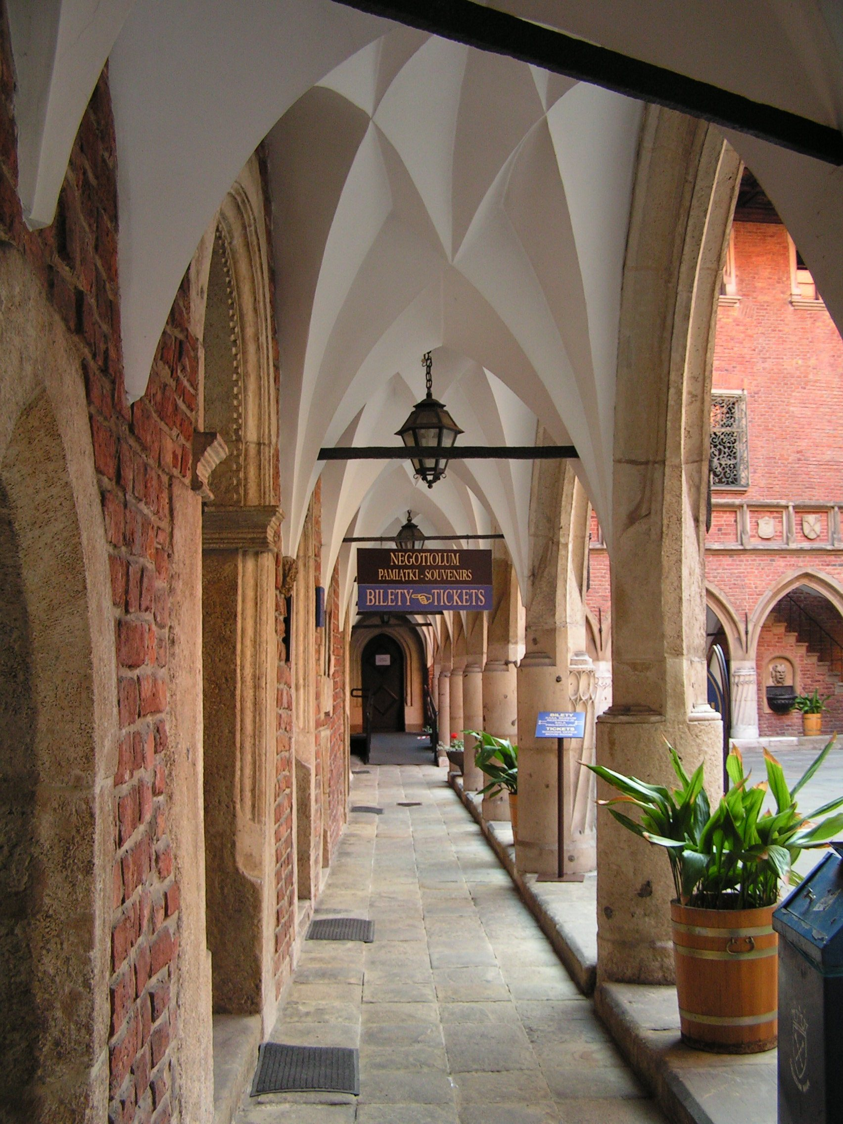 Collegium Maius, Kraków